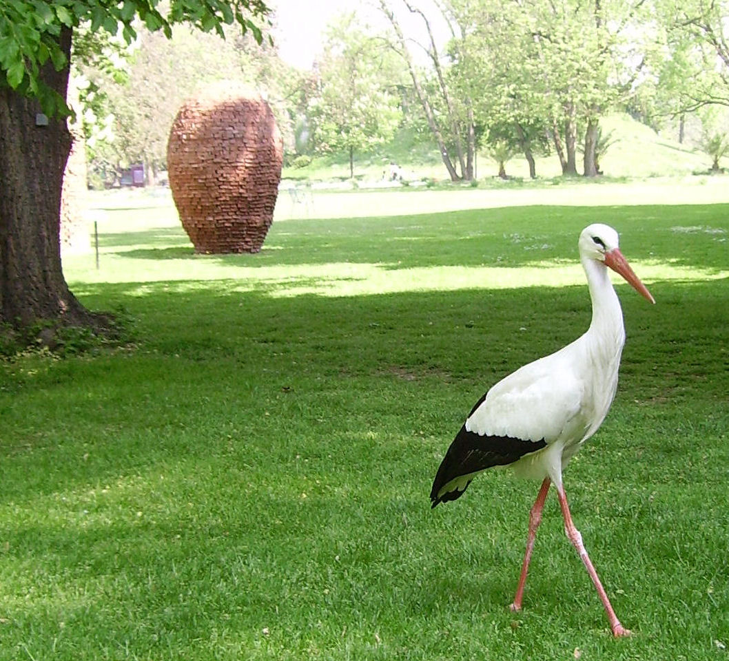 Sculpture Piazza Verde (3-part) from 2003 by Reiner Seliger in Luisenpark in Mannheim, Germany